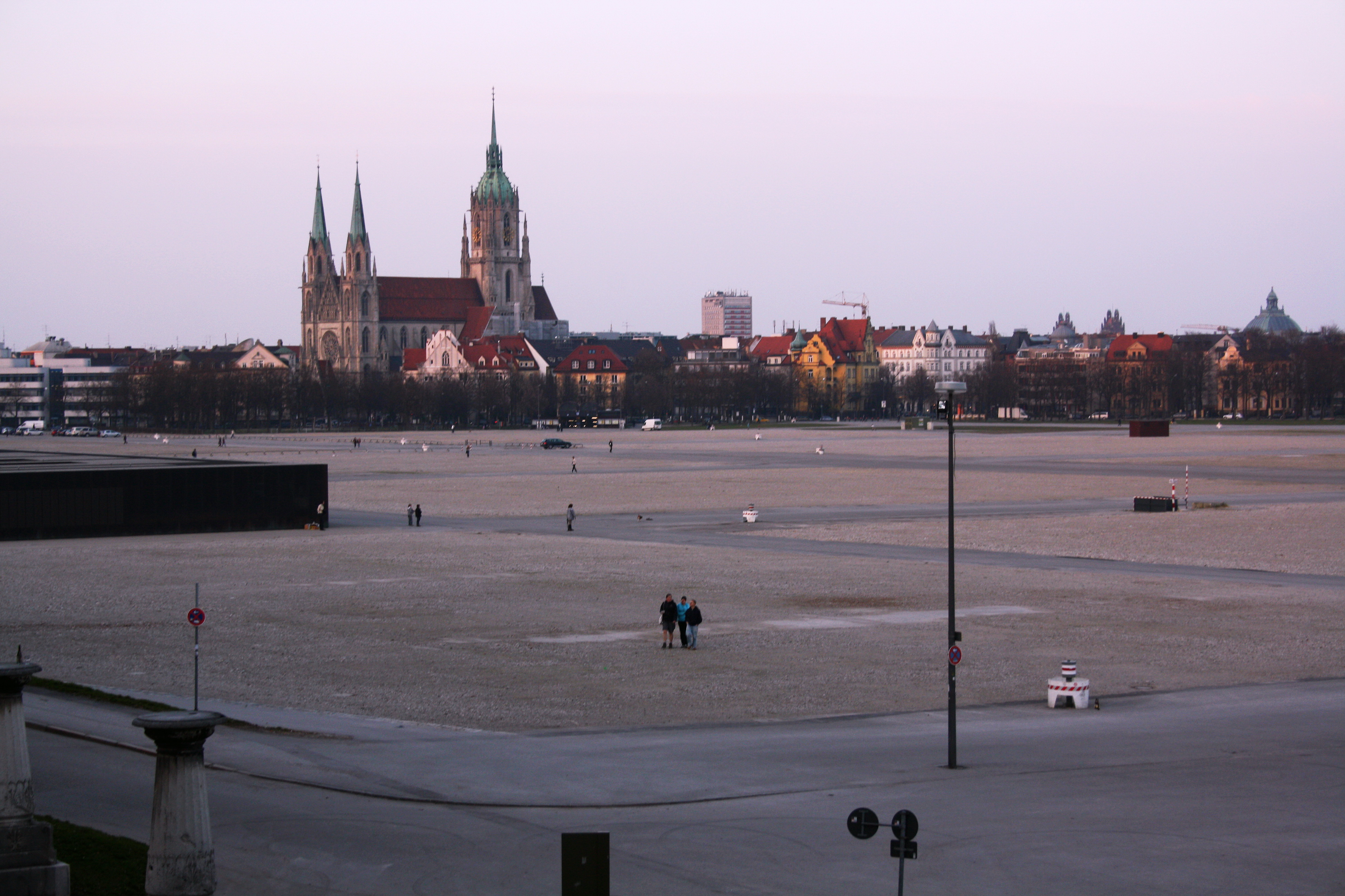 Theresienwiese mit St. Paul Kirche im Hintergrund